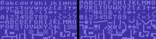 Die beiden Fonts des C64, a) Klein- und Großschrift, b) Großschrift und Symbole